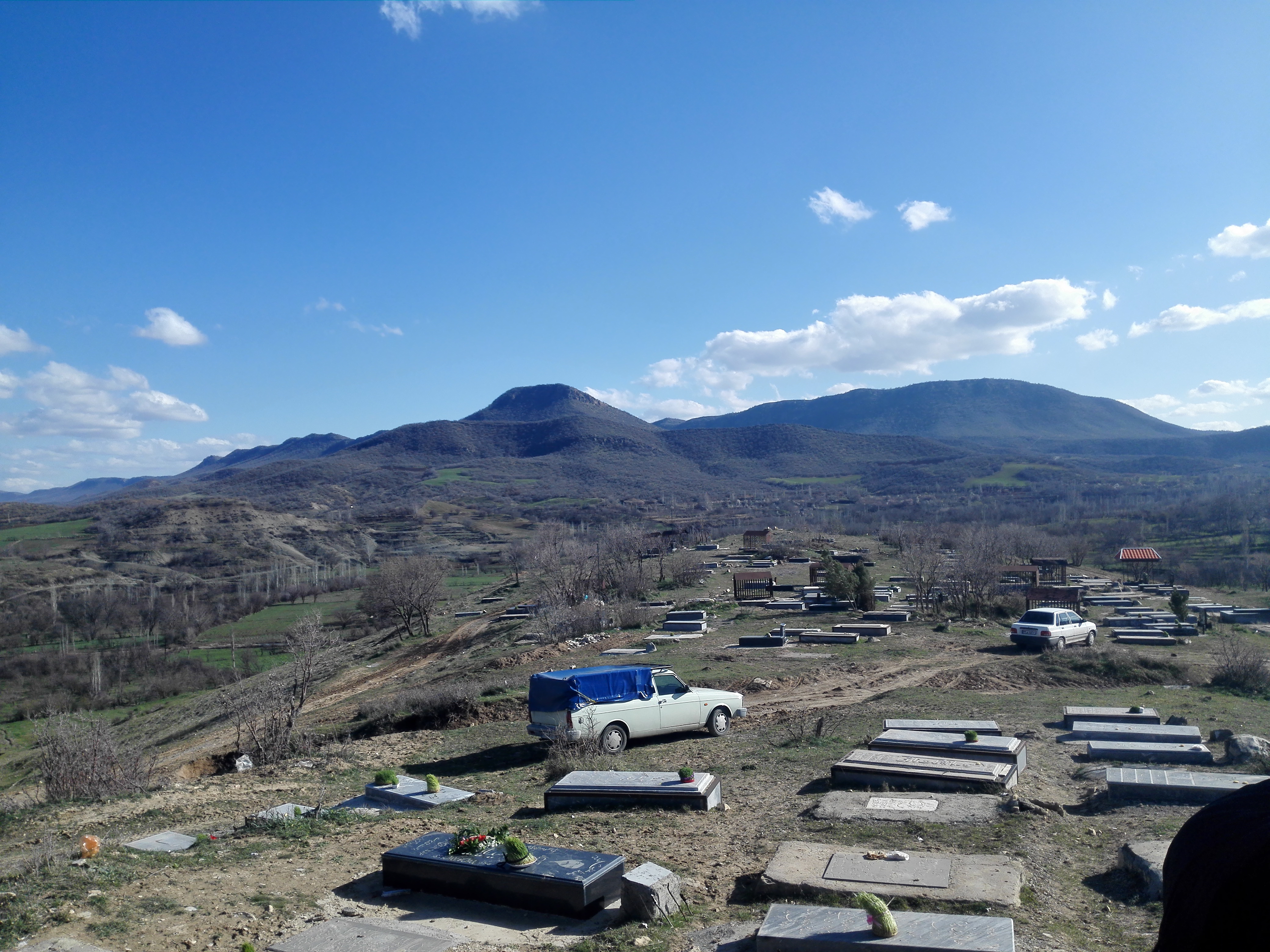 گورستان بالاجوب گهواره،در روز پنج شنبه ۲۸اسفند۱۳۹۴